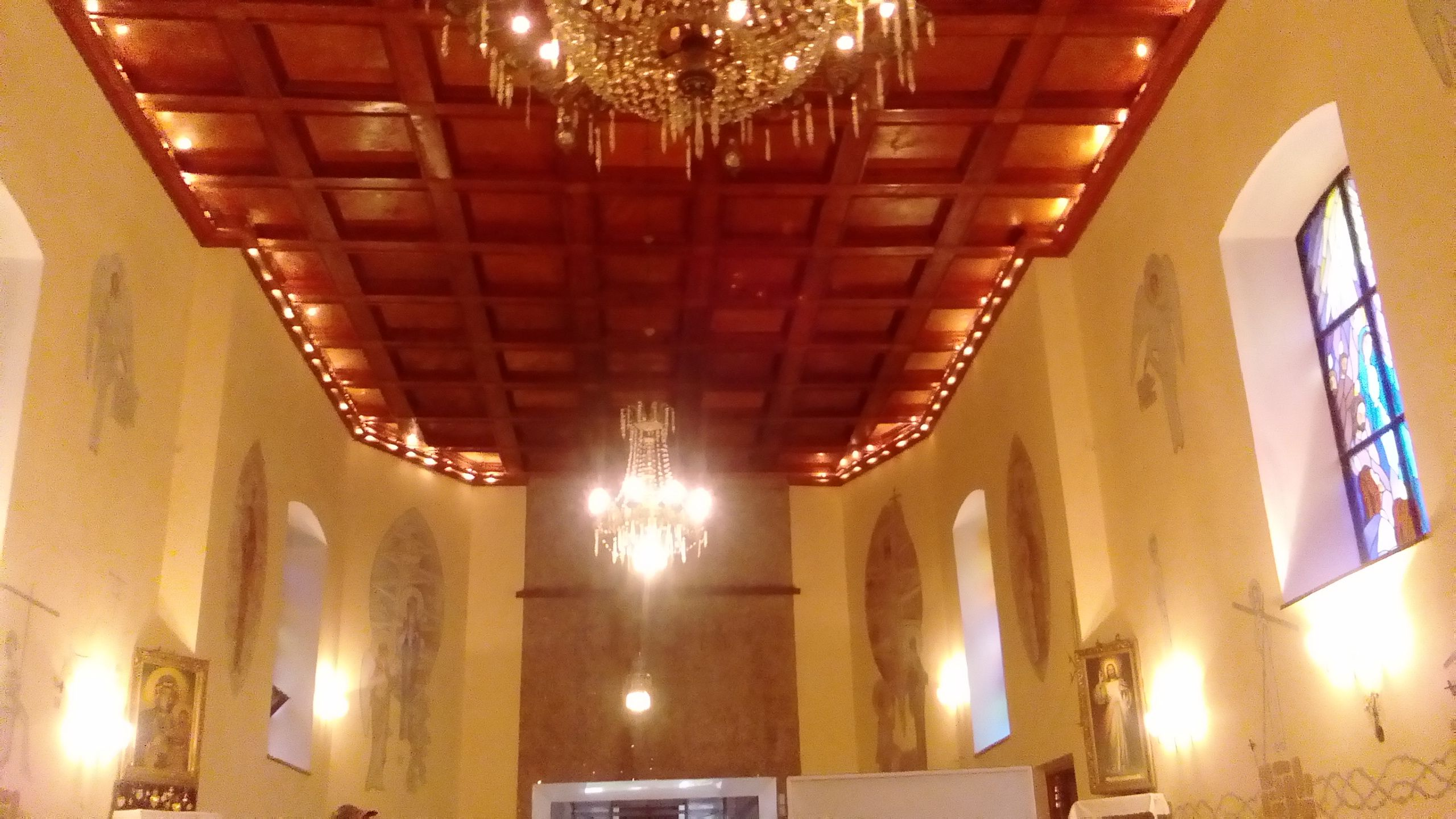 Wnętrze kaplicy pogrzebowej w Czaszynie